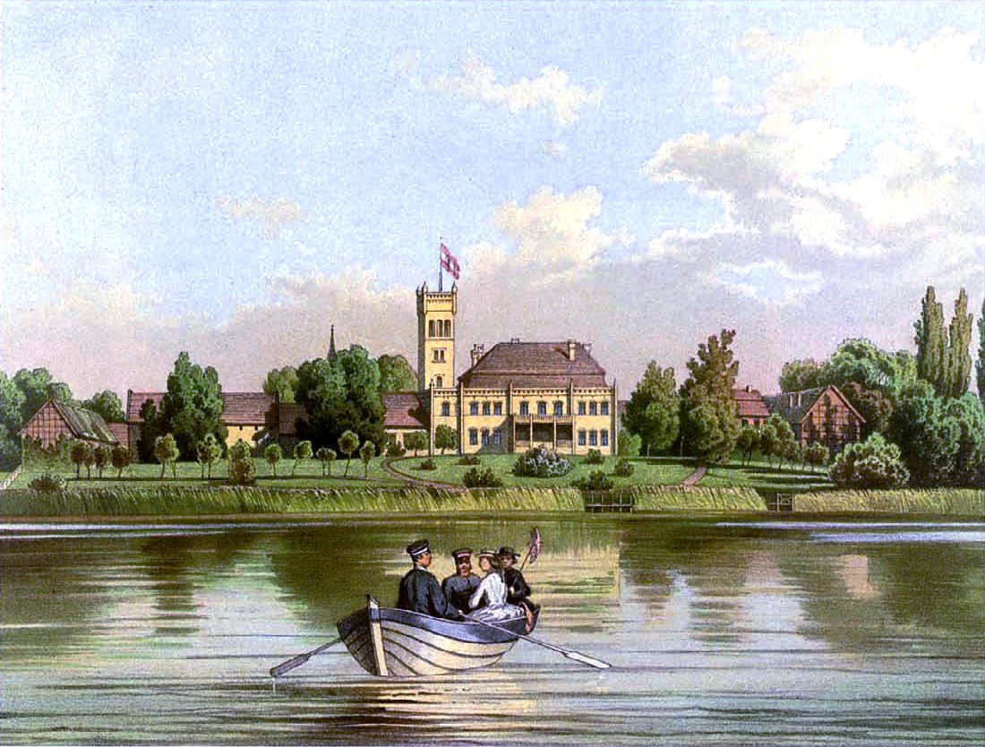 Schloss Ribbekardt, Kreis Greifenberg i. Pom., Lithographie von Alexander Duncker, 1869